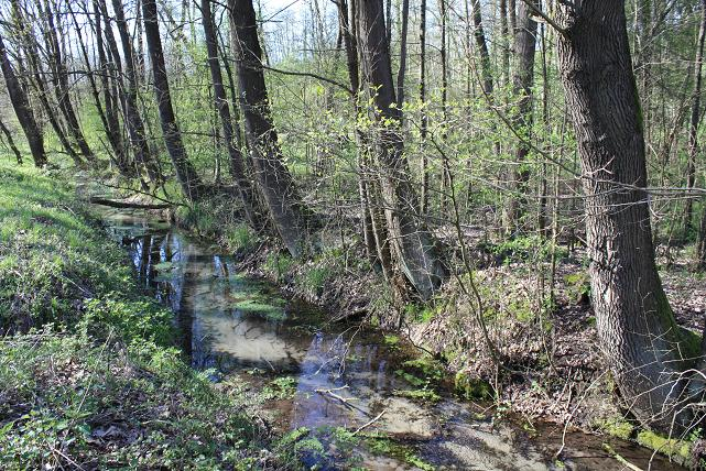 SIC Boschi del Vignolo, ZPS Boschi del Ticino, Italy, Garlasco, Parco Lombardo della Valle del Ticino